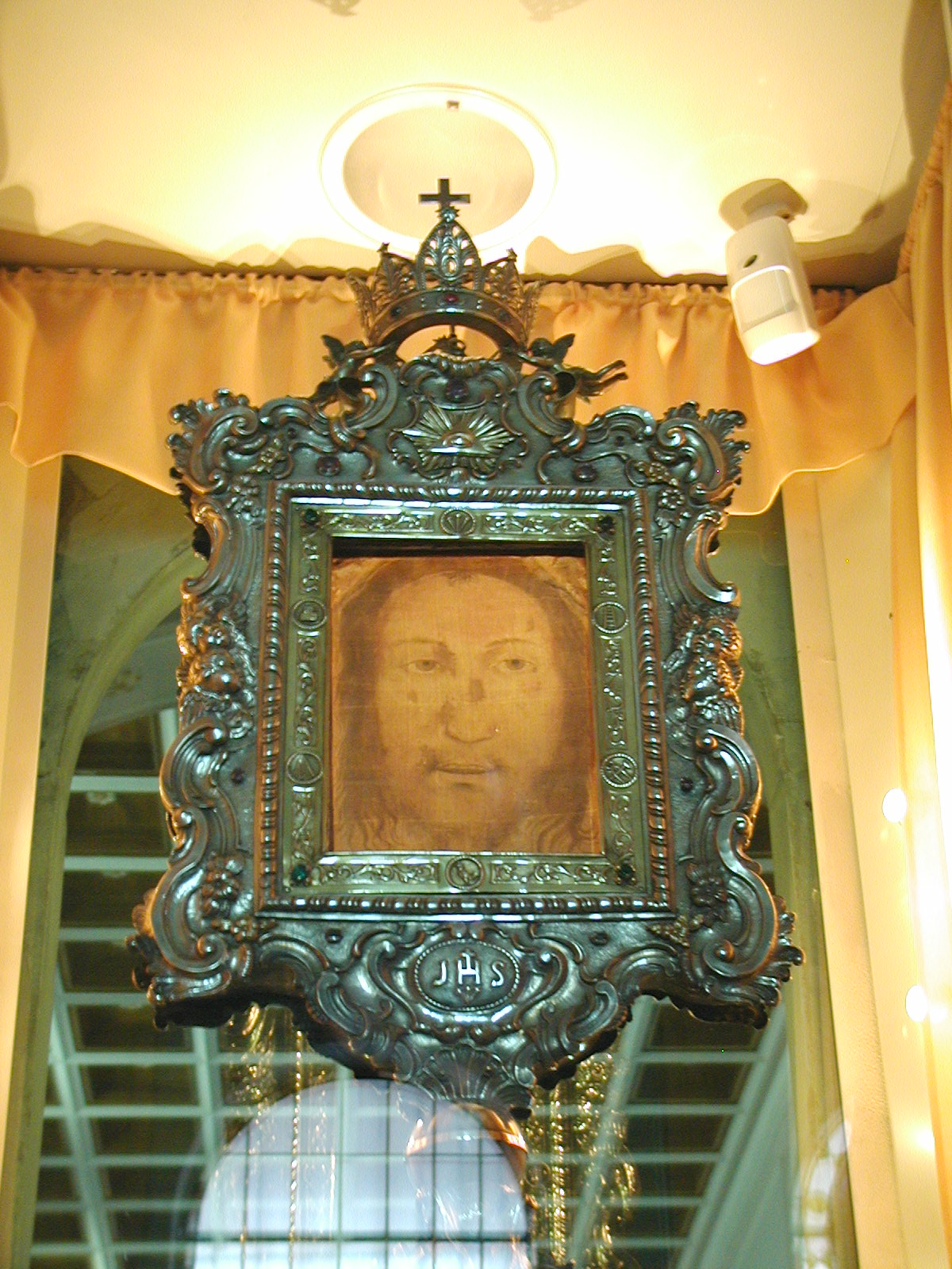 Der Altar mit dem Schleier in der Mitte